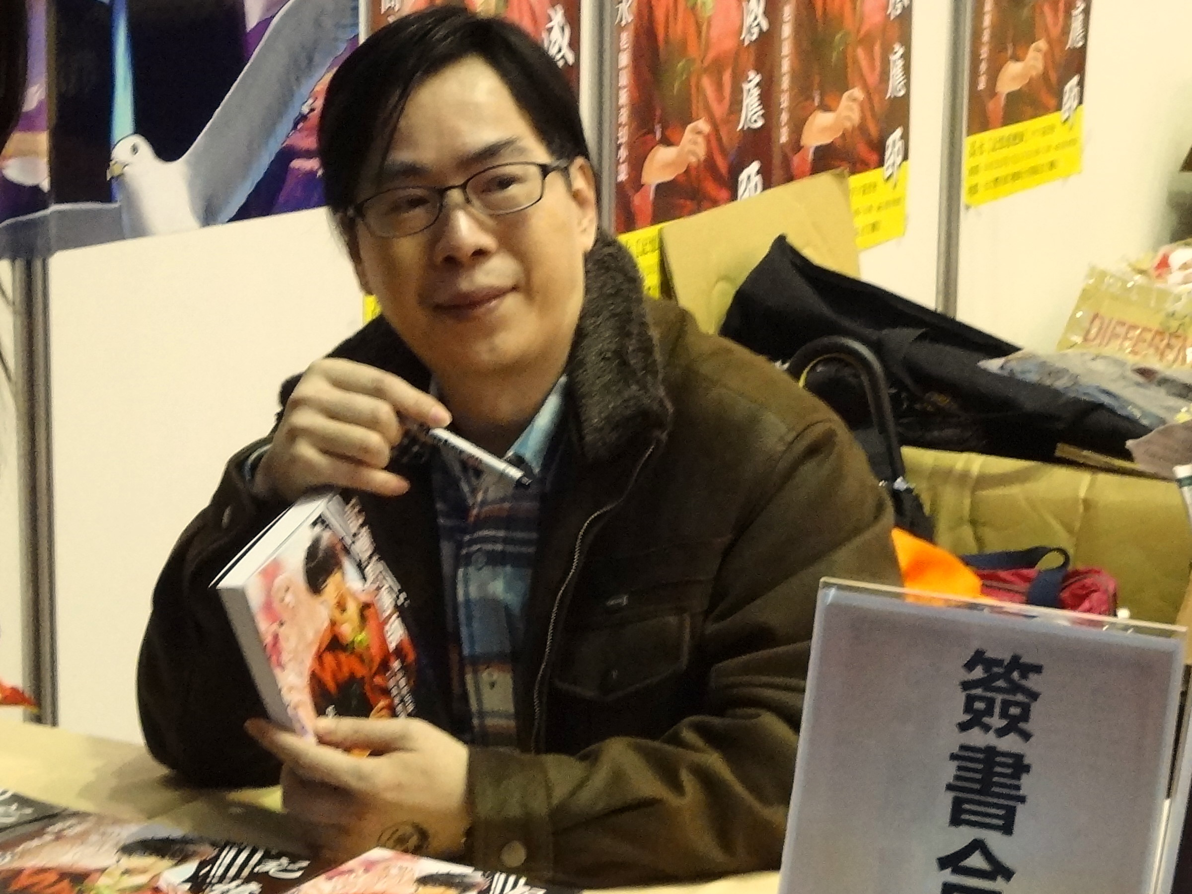 第31屆開拓動漫祭，國立臺灣大學綜合體育館三樓展場，漫畫家高永小說《記憶感應師》簽書會。